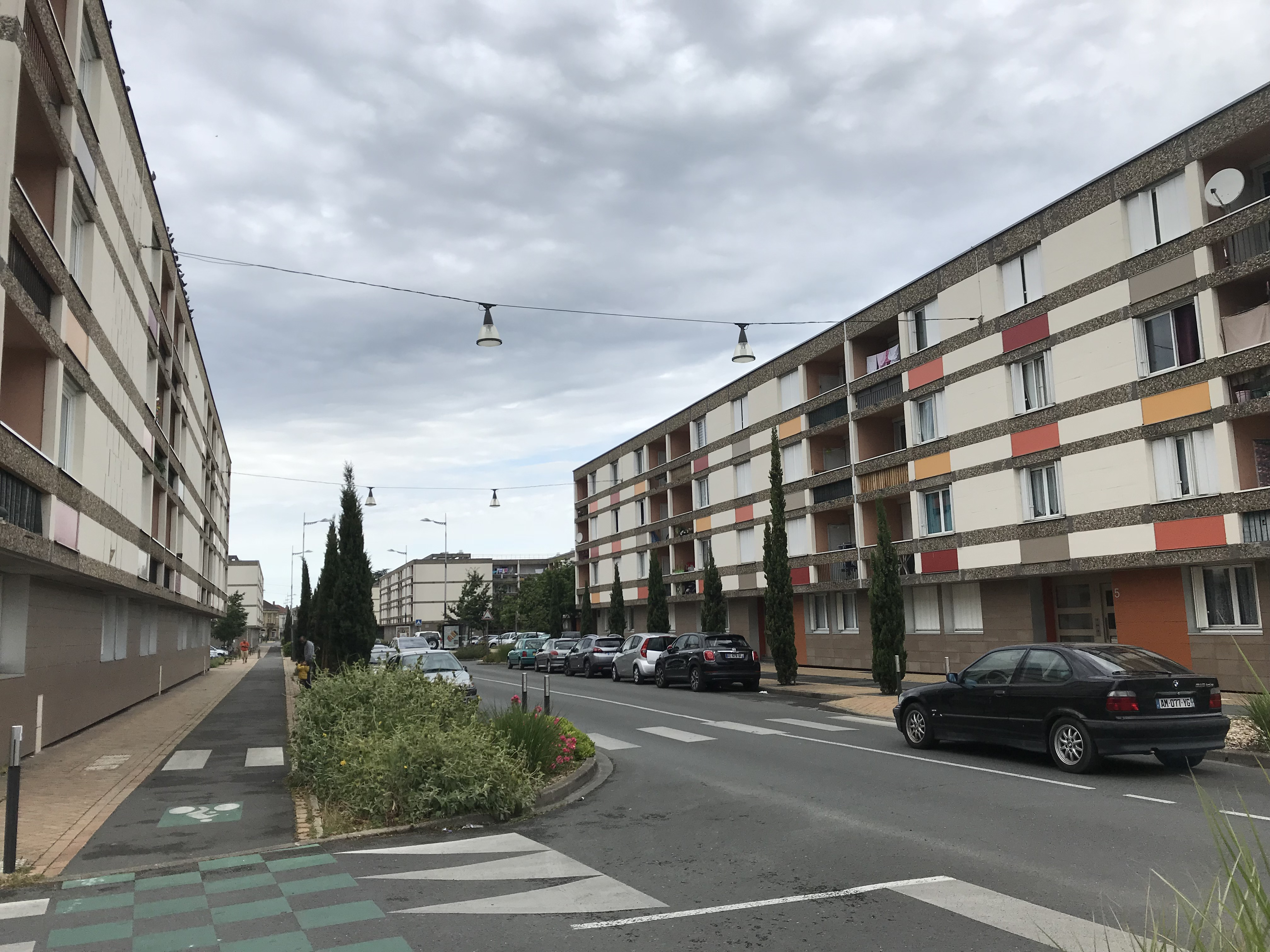 HLM à Bergerac